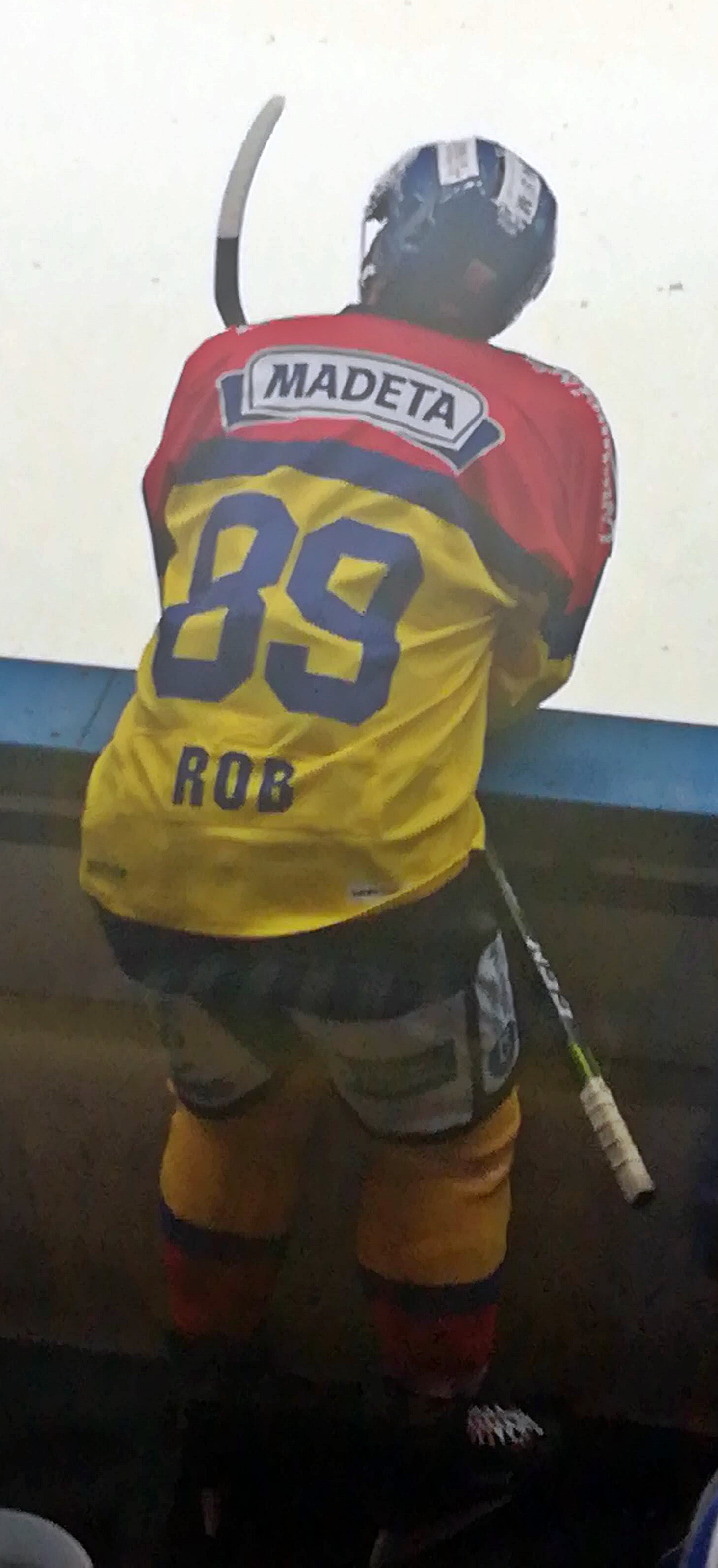 HC Zubr Přerov - ČEZ Motor České Budějovice